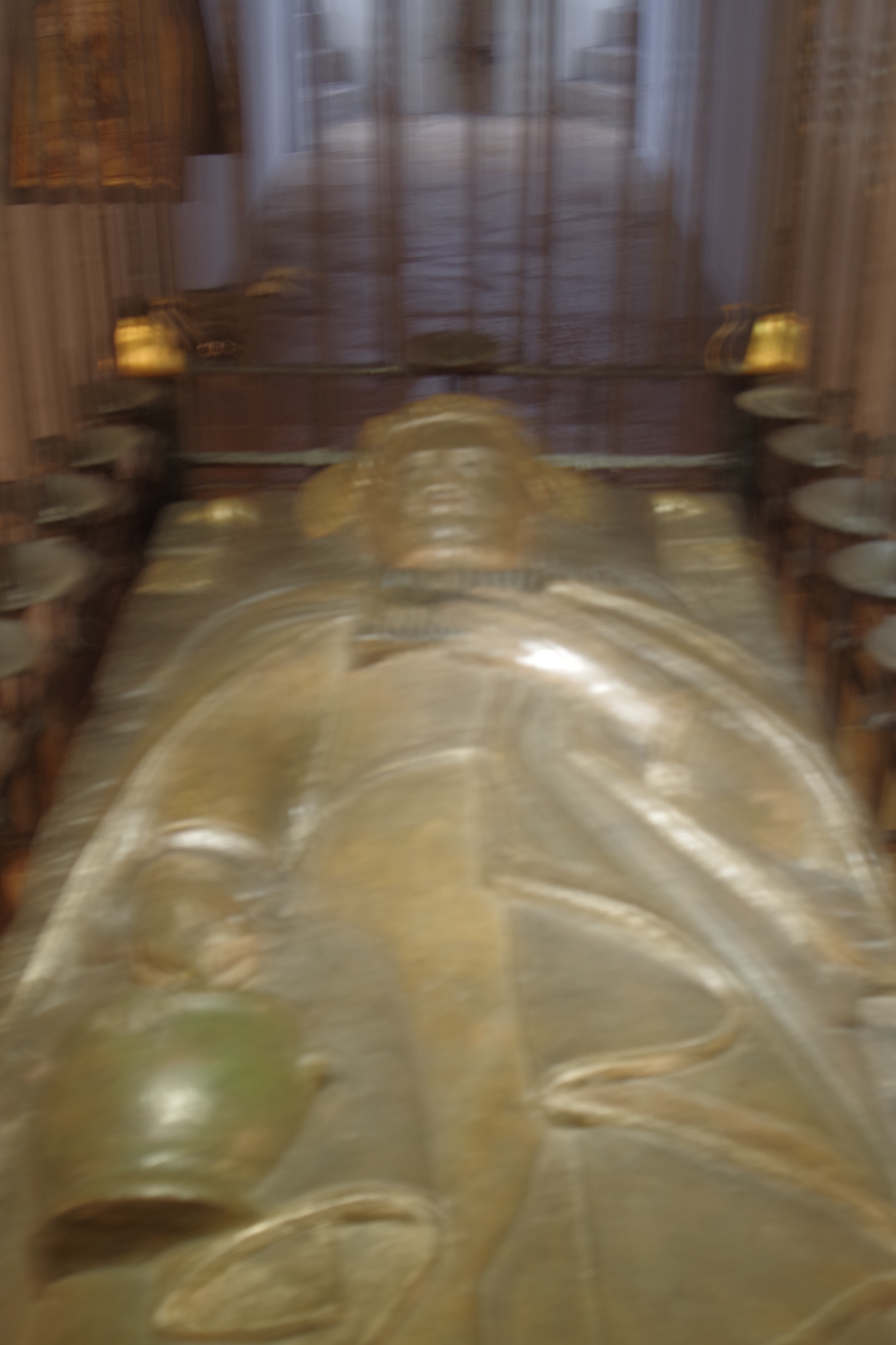 Hl. Verena